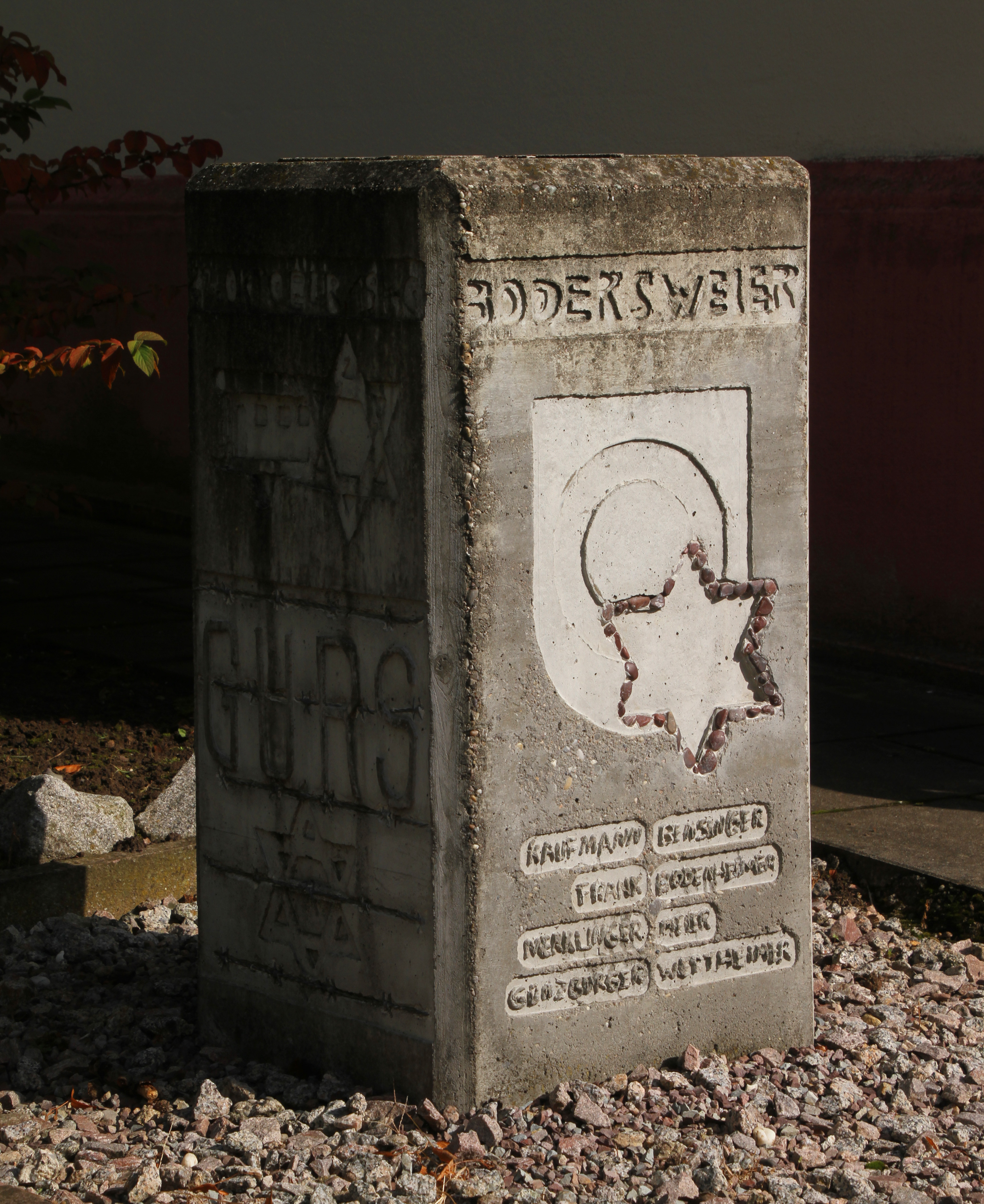 Kehl-Bodersweier.